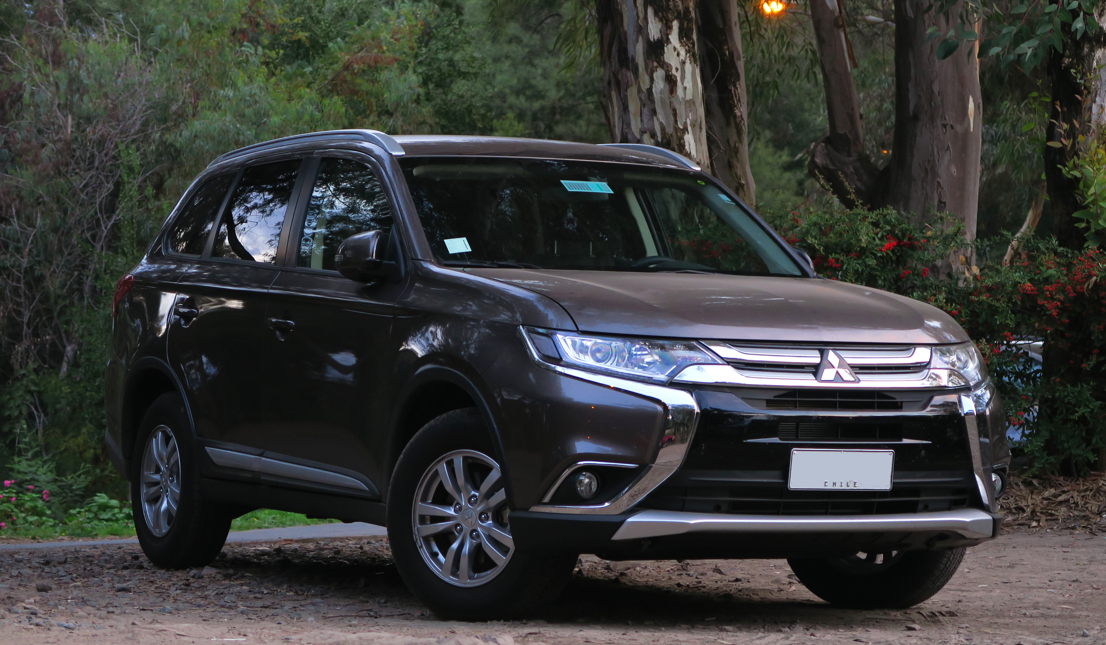 Mitsubishi Outlander 2018